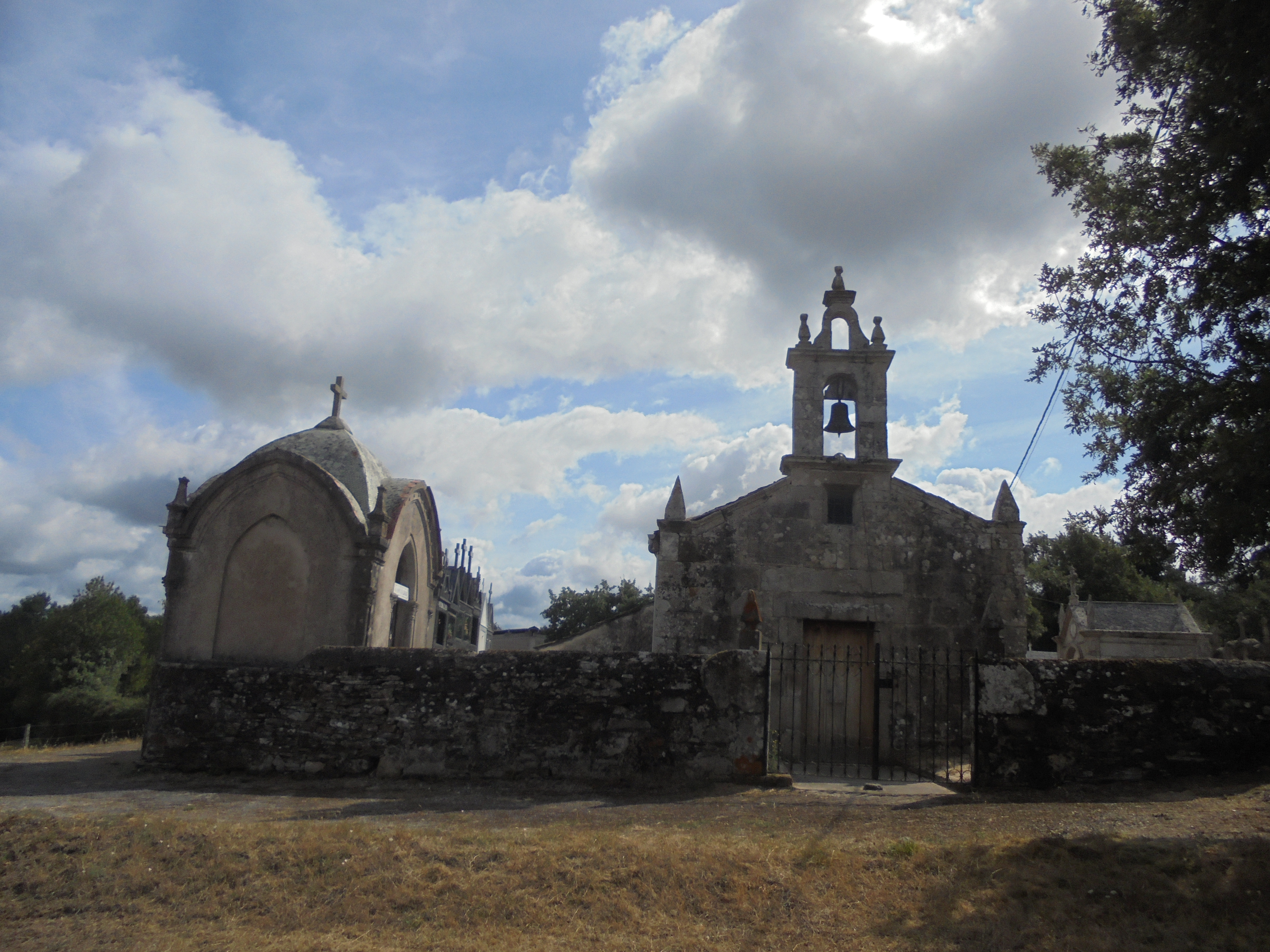 Igrexa parroquial de Escoureda ( O Corgo)